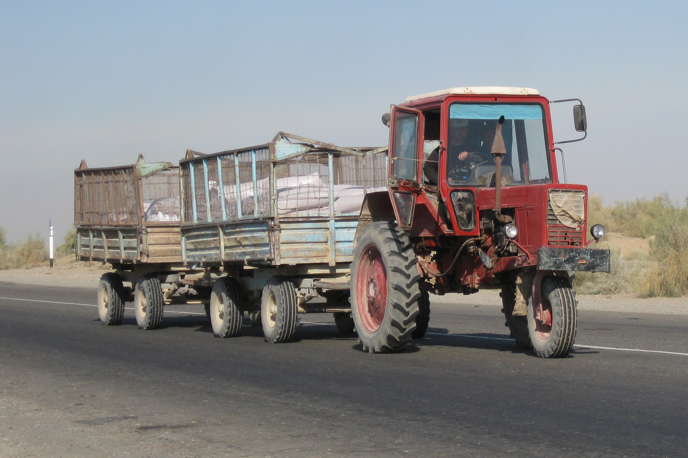 Dreirad-Traktor MTZ-80X in Usbekistan